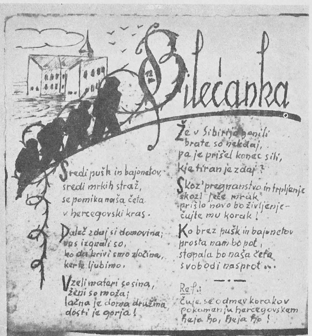 Bilečanka slovensko